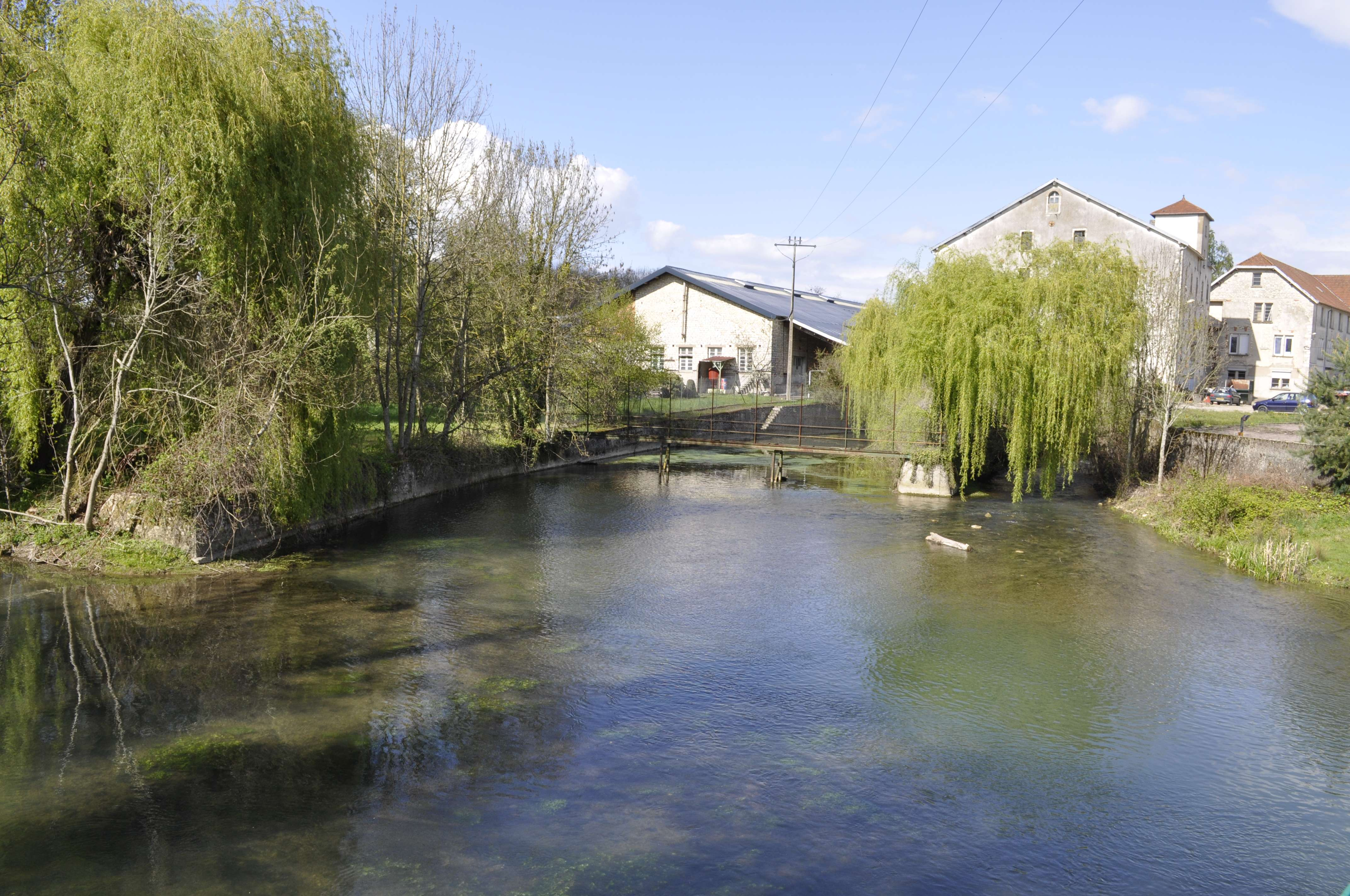 La Bèze à Bezouotte (Côte d'Or).